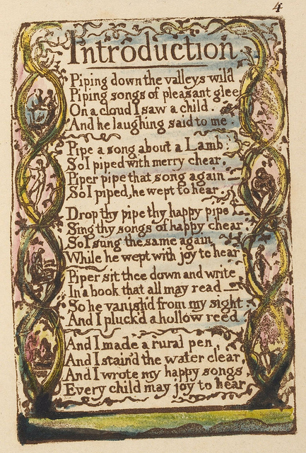 Disegno realizzato dall'autore per la pagina dedicata alla poesia Introduction della raccolta Songs of experience.